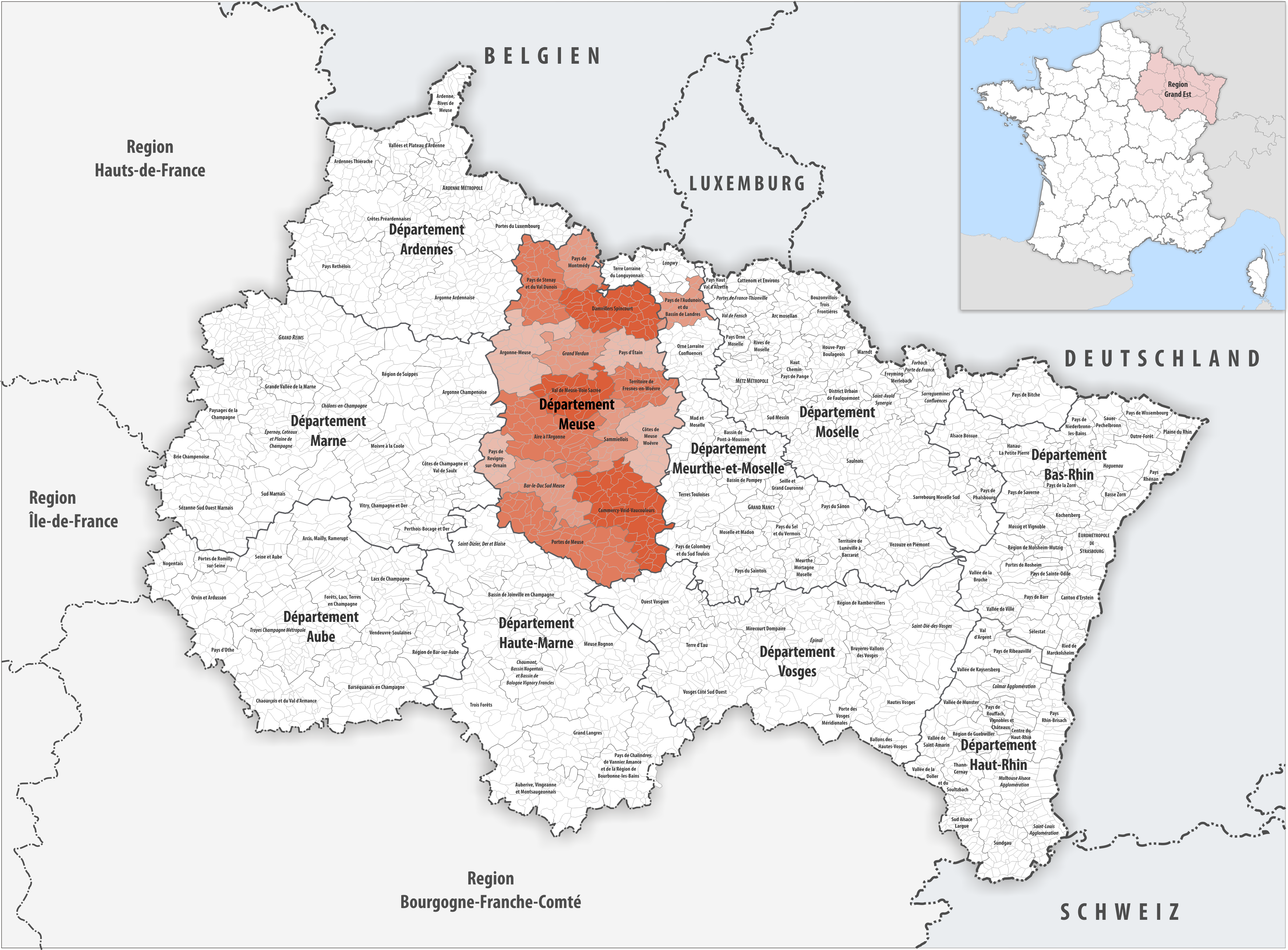 Gemeindeverbände im Département Meuse